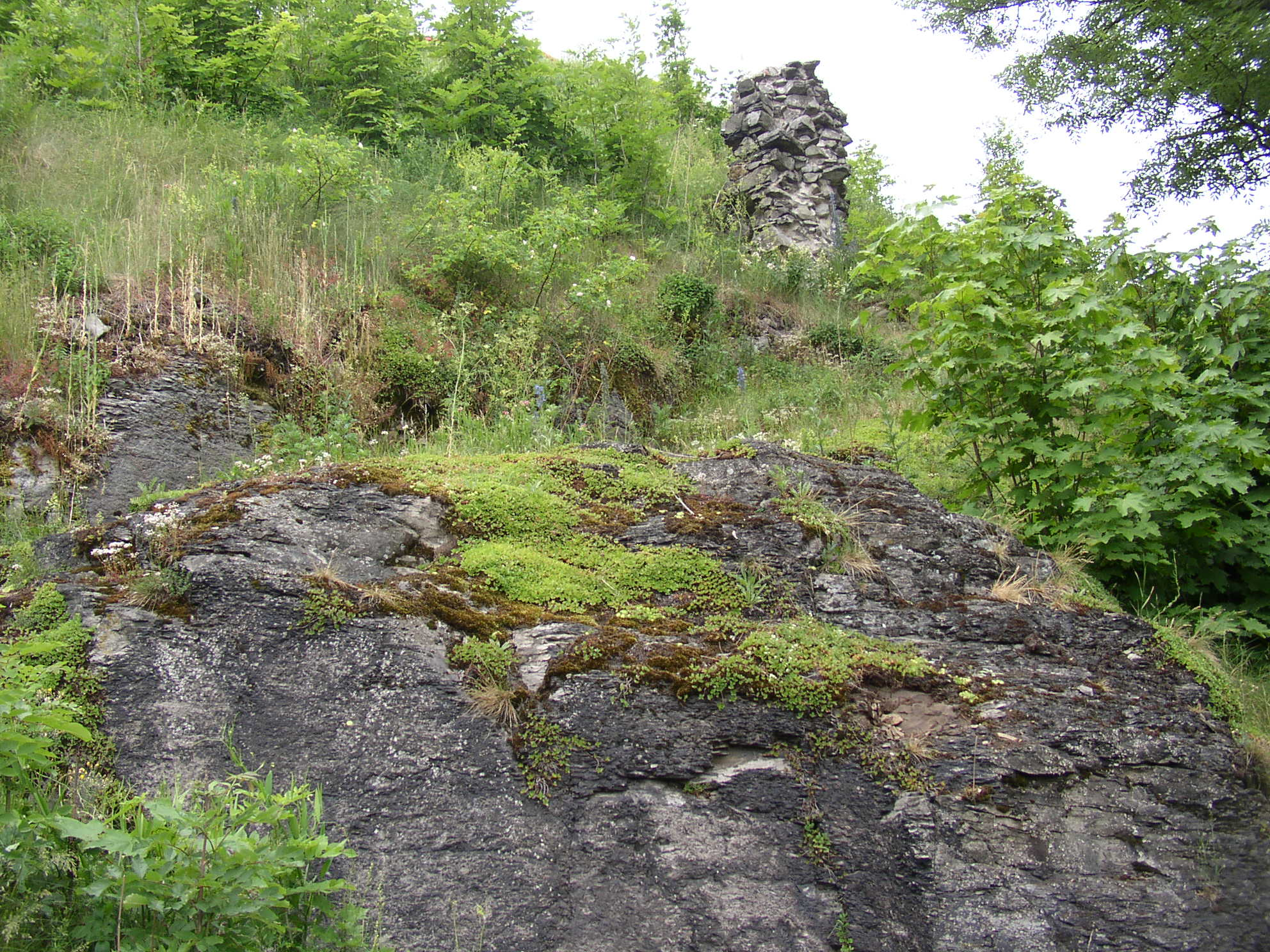 Zbytky starého vartenberského hradu na Tolštejně